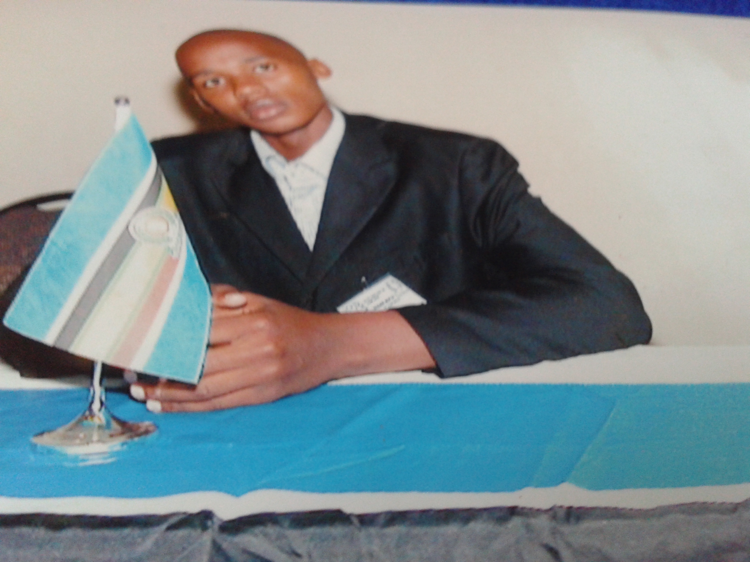 Kiswahili: Picha halali ya Ndg. Donati Salla.